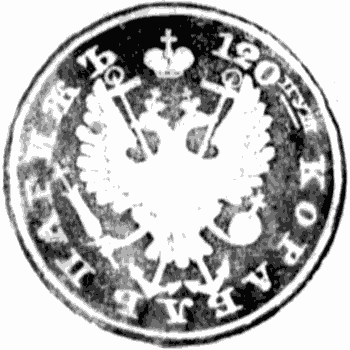 Оттиск печати линейного корабля Париж